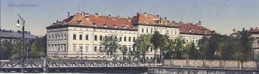 Taubstummen-Anstalten, Chemitzer-Straße 1945 wurde die Schule bei den Luftangriffen am 13. Februar komplett zerstört.